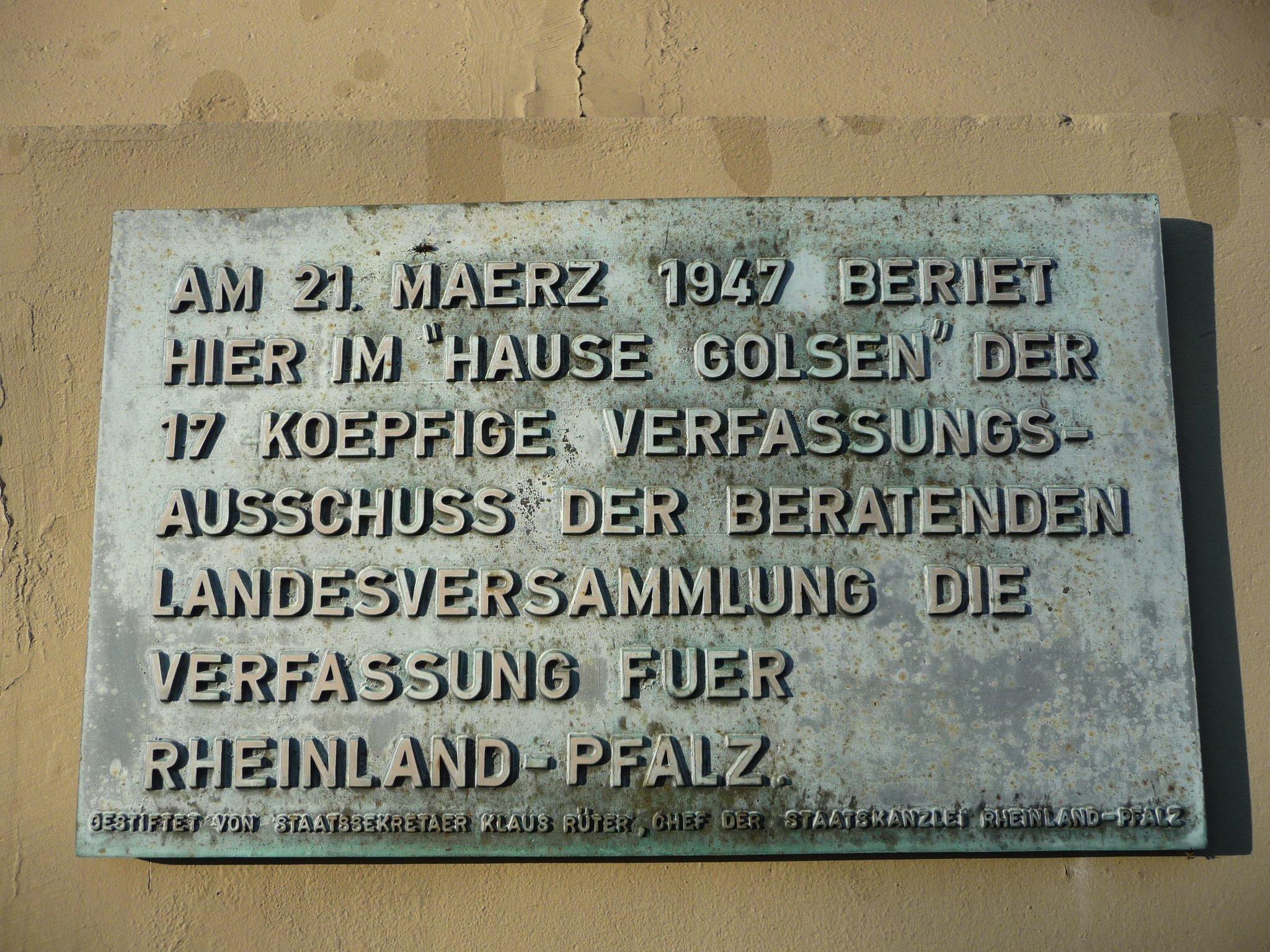 Zell, Ortsteil von Zellertal in Rheinland-Pfalz